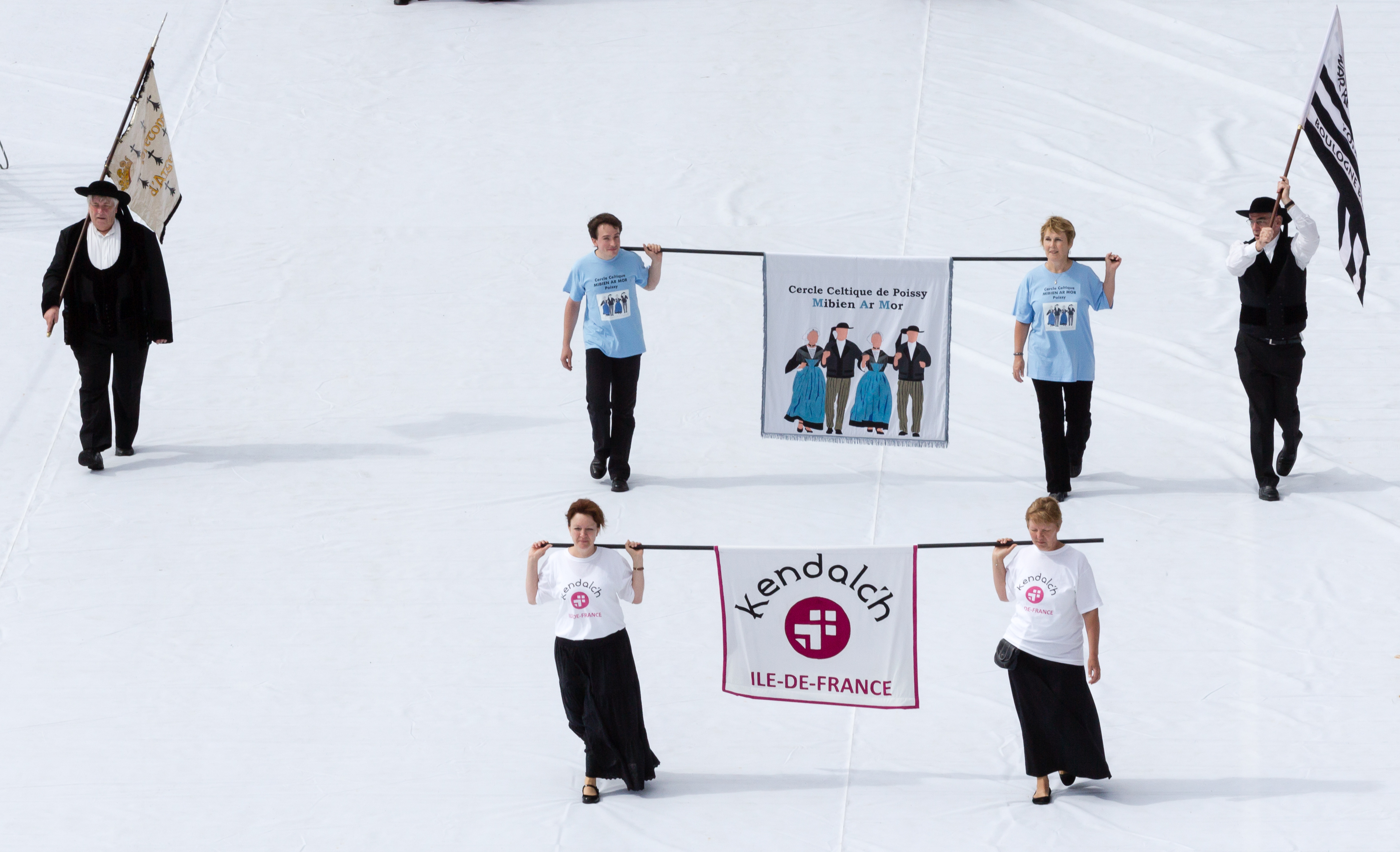 FIL 2012 - Arrivée de la grande parade des nations celtes - Kendalc'h Île-de-France